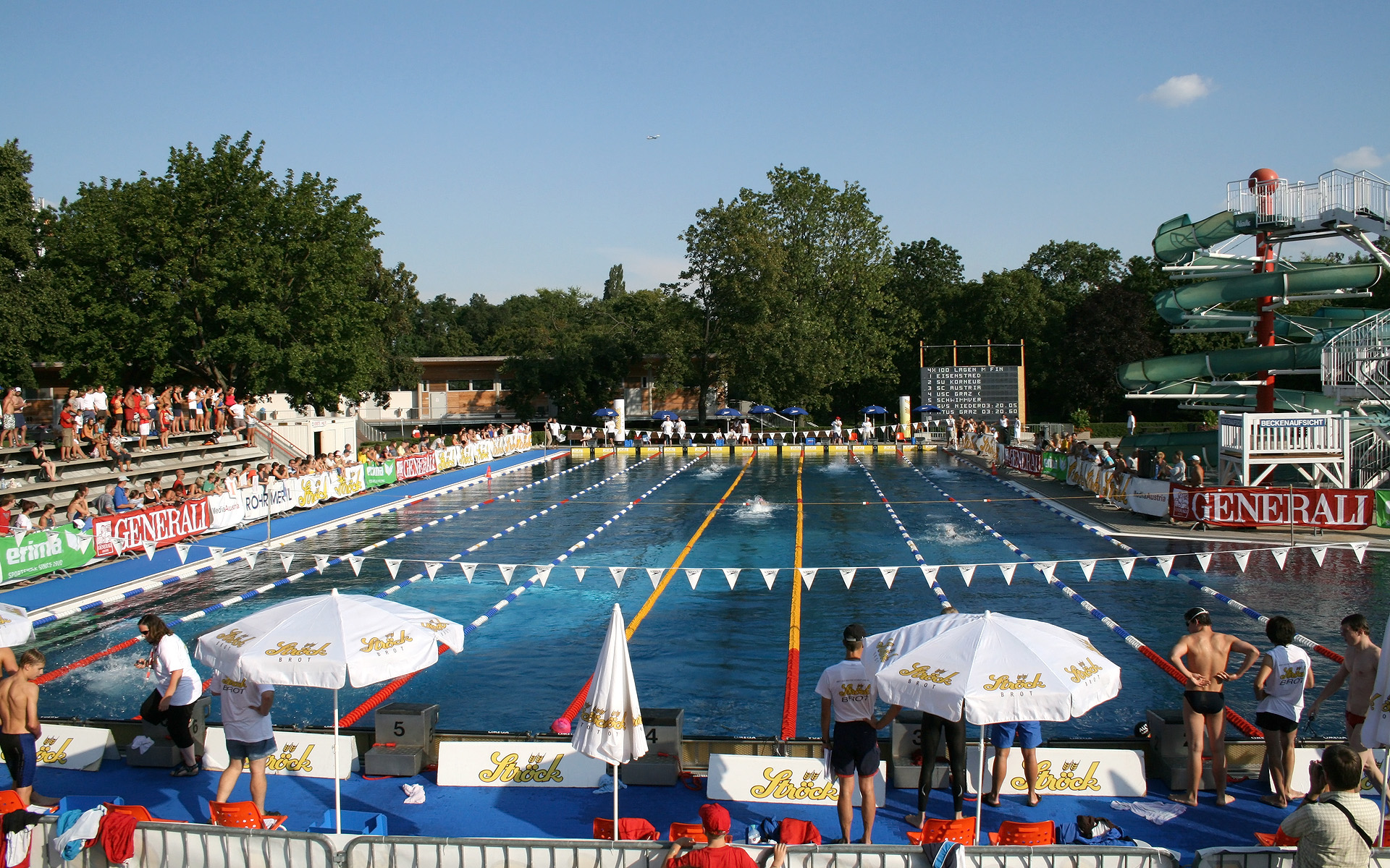 Österreichische Staatsmeisterschaften im Schwimmen 2008 im Freibad des Freizeizentrums von Schwechat, Niederösterreich (Finale der Männer über 4x100m Lagen)